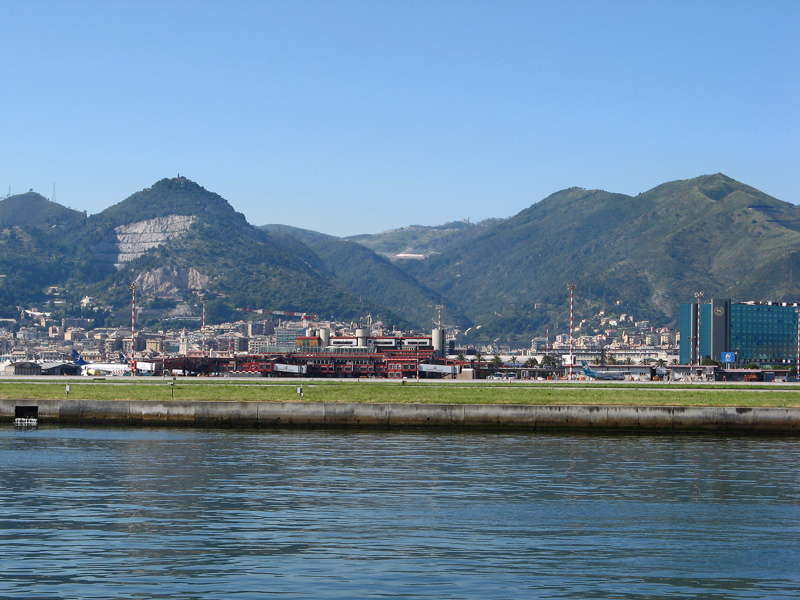 Aeroporto di Genova C.Colombo GOA/LIMJ visto dal mare